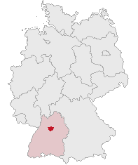 Landkreis Ludwigsburg, Baden-Württemberg, Germany